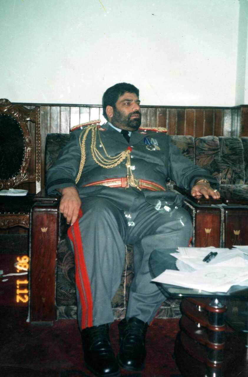 Major General Mohammad Akram Khakrizwal